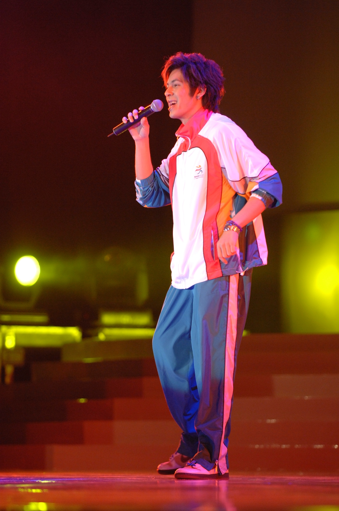 Jogos da Lusofonia de Macau